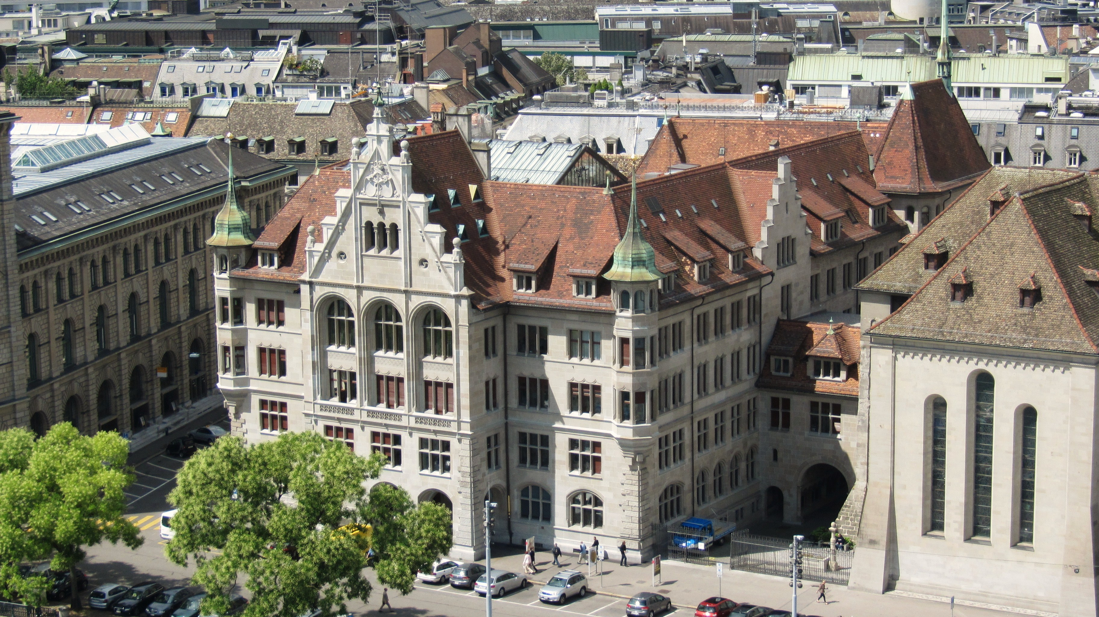 Zürich,Stadthaus,Stadthausquai 17